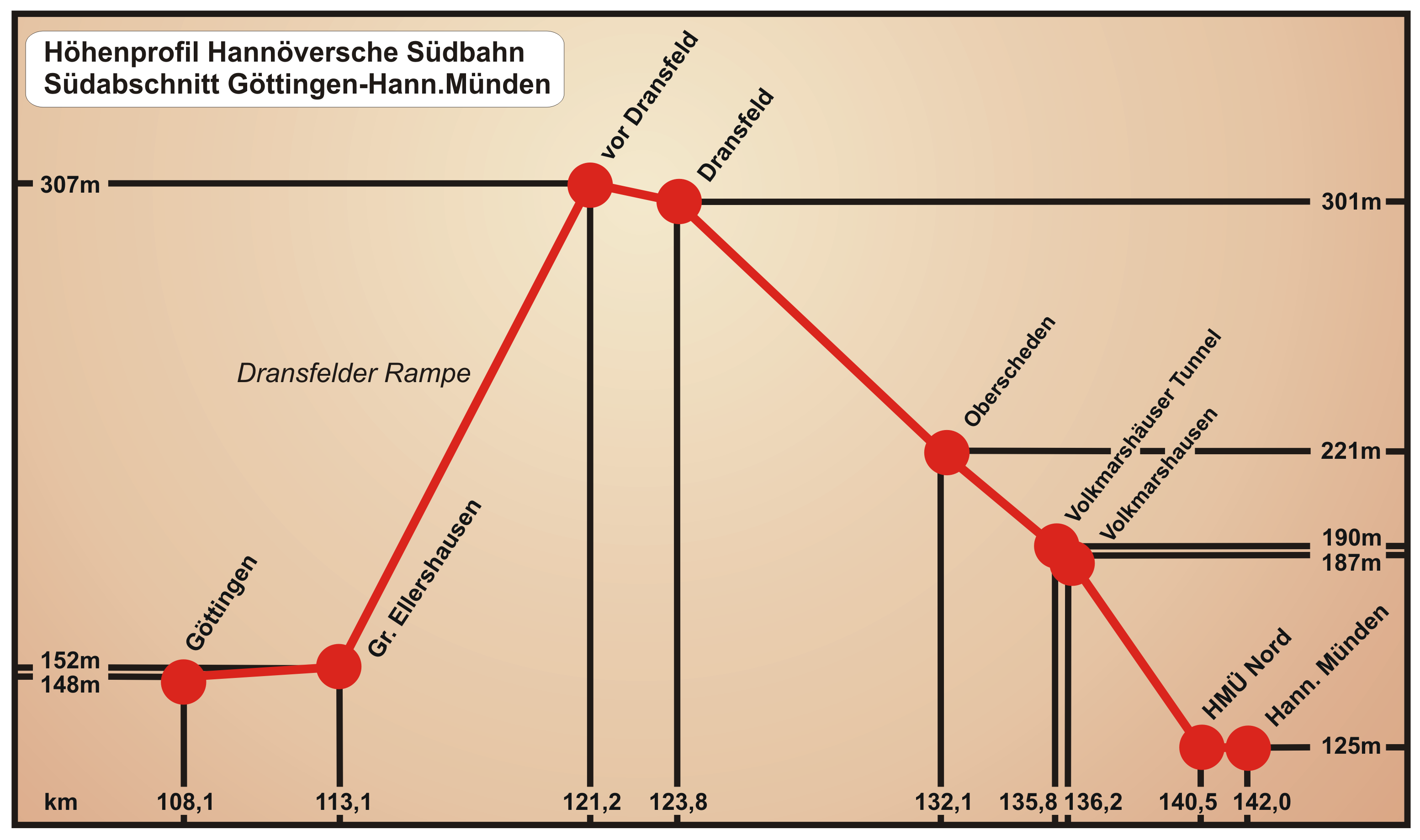 Hoehenprofil der Hannoeverschen Suedbahn, Suedabschnitt